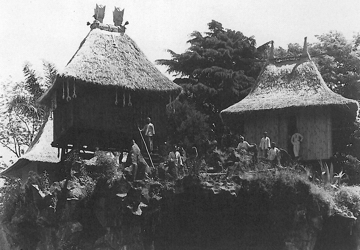 "Aldeia de Timor", Timor Leste, Exposição Colonial de 1934